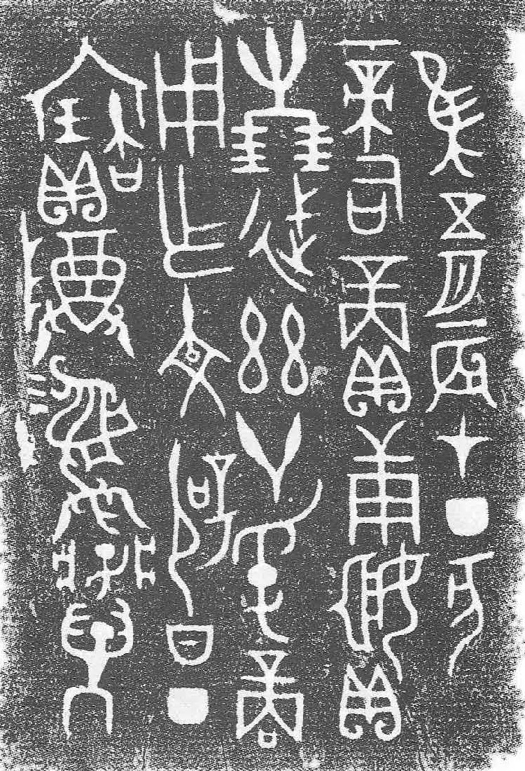 商尊（庚姬尊）内底铭文拓片，商尊1976年陕西省扶风县庄白村一号西周青铜器窖藏出土